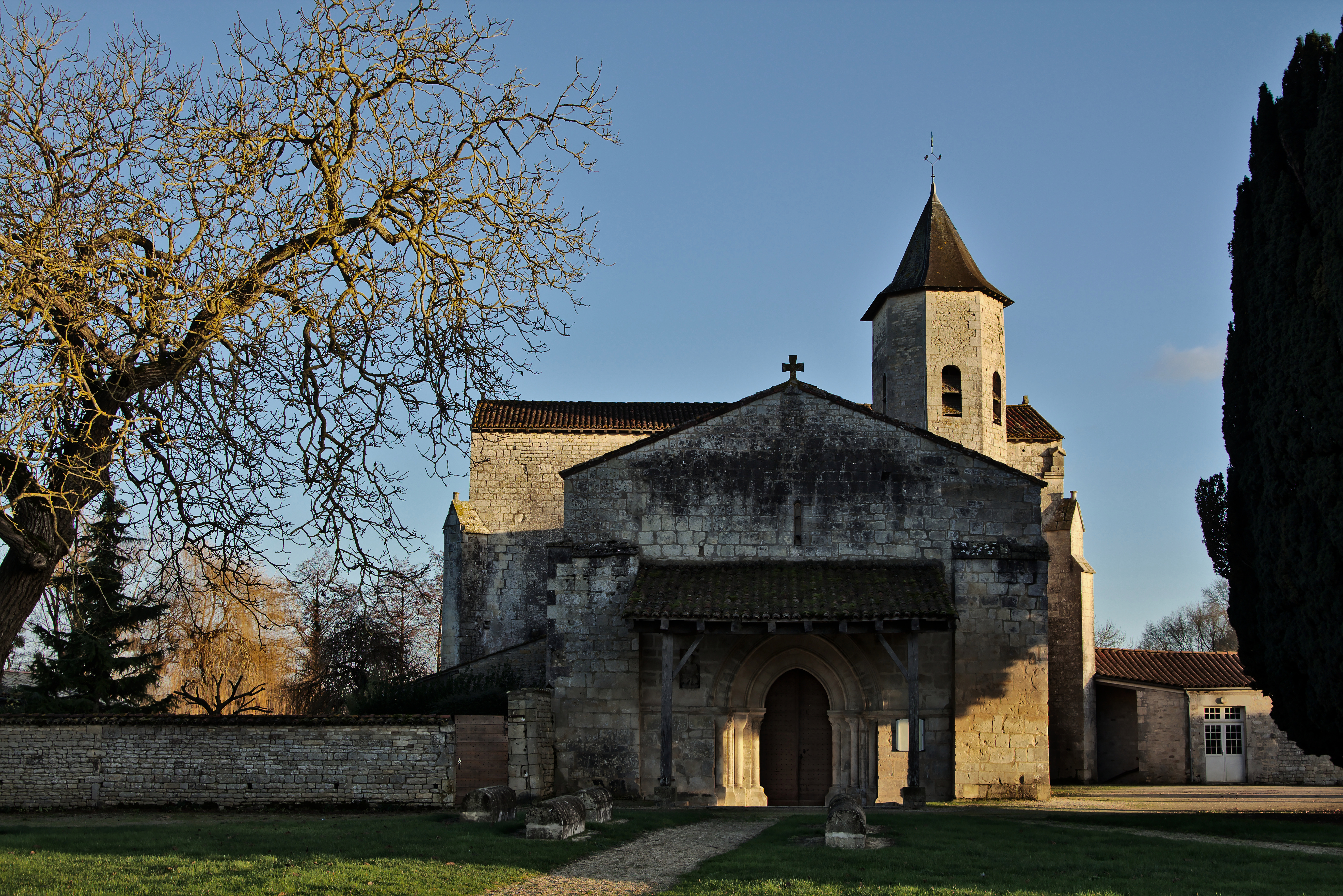 Église Saint-Pierre-ès-Liens de Secondigné-sur-Belle